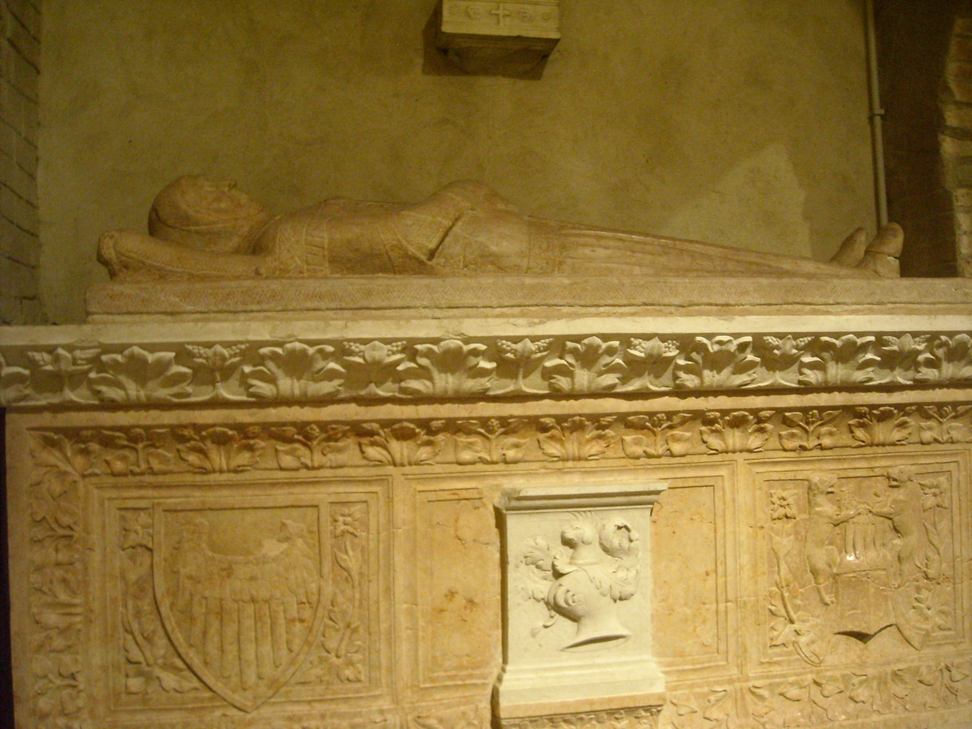 Interno della Chiesa delle Sante Teuteria e Tosca